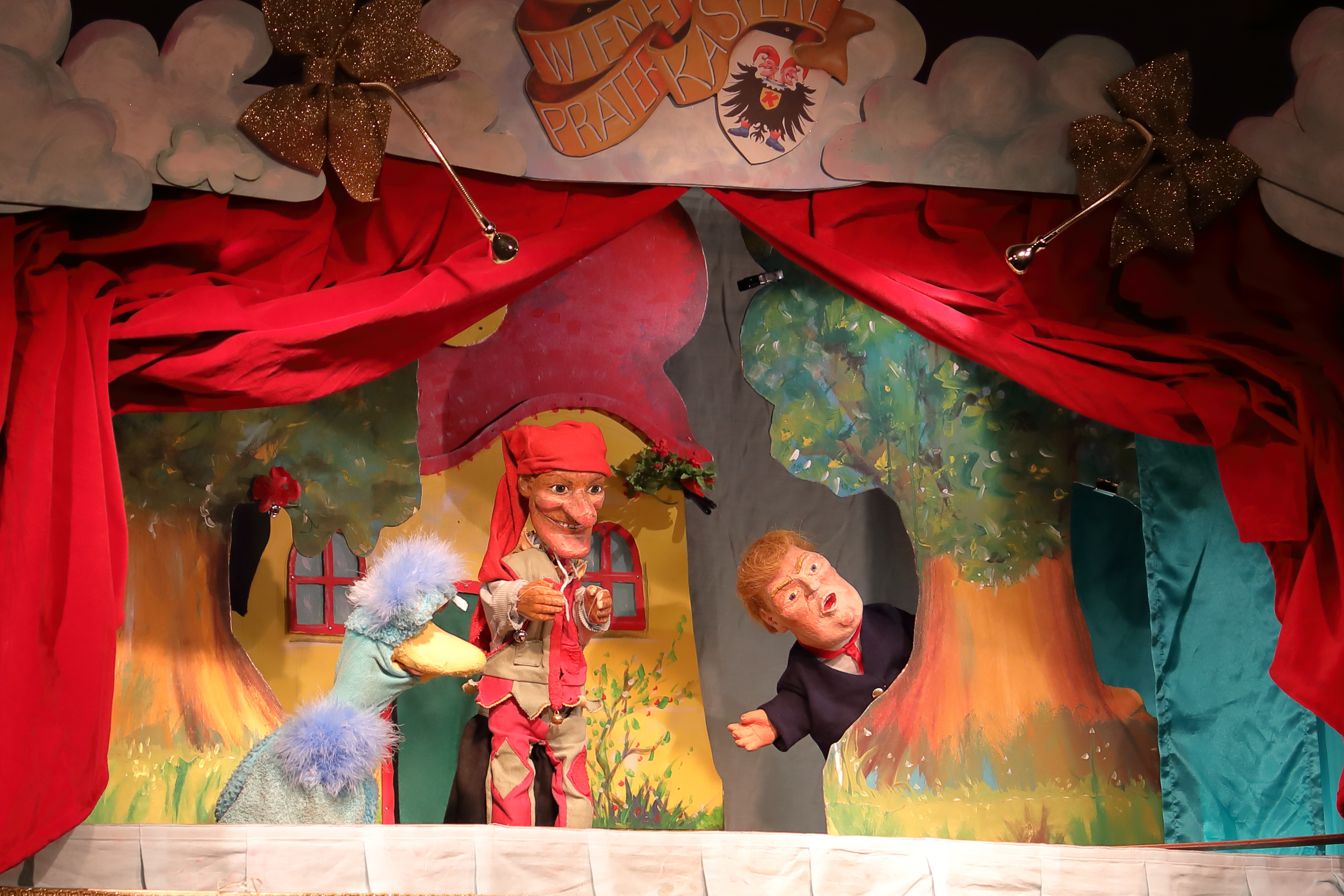 Das Original Wiener Praterkasperl von Elis Veit und Thomas Ettl bei einem Gastspiel im Club W71, Weikersheim. Der Auftritt war zwischen der sog. "Ibiza-Affäre" und einen Tag vor der Europa-Wahl 2019.